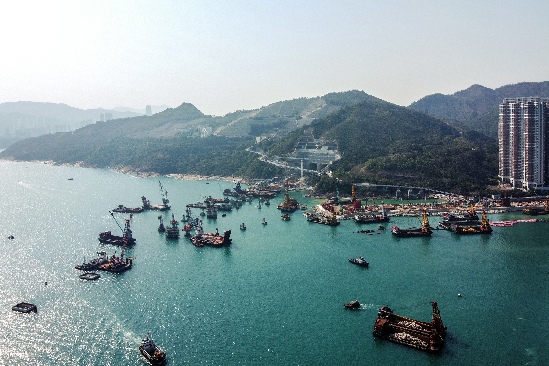 Cross Bay Link Tseung Kwan O site